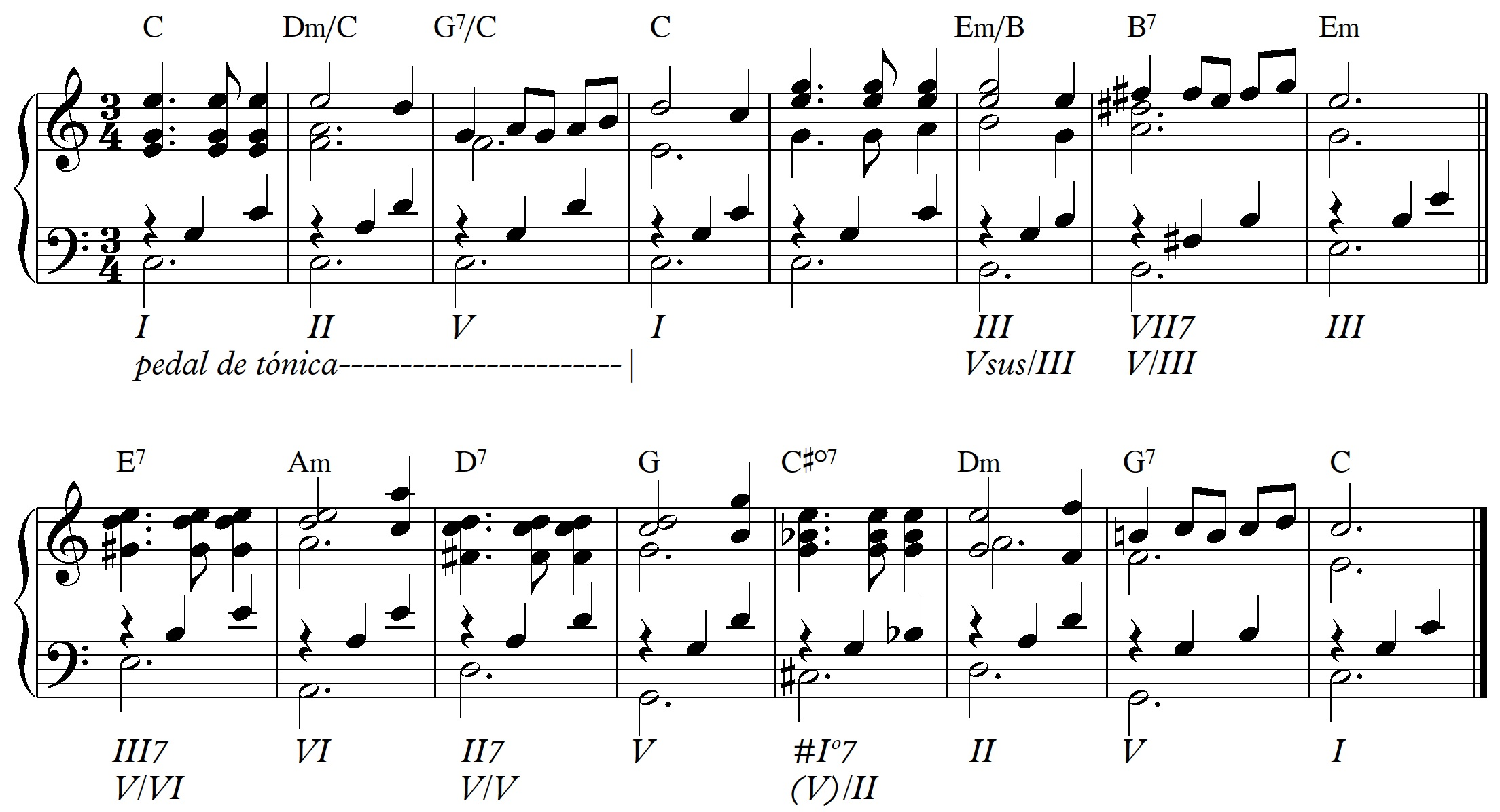 Fragmento de una composicion analizada